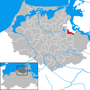 Wendorf in Mecklenburg-Vorpommern - District Nordvorpommern